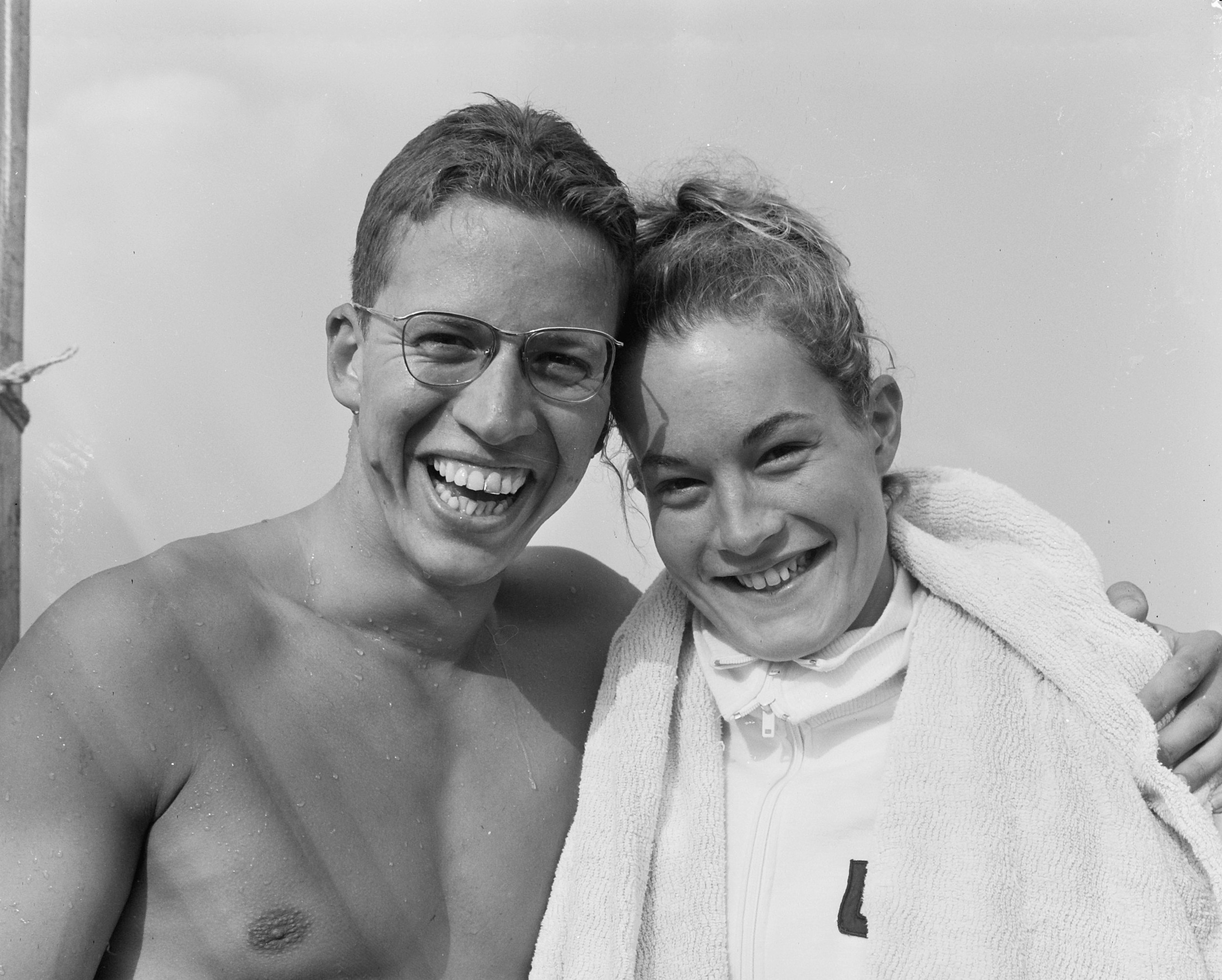 Zweminterland Nederland B tegen Denemarken, (l) B. Pedersen , (r) Kirsten Strange